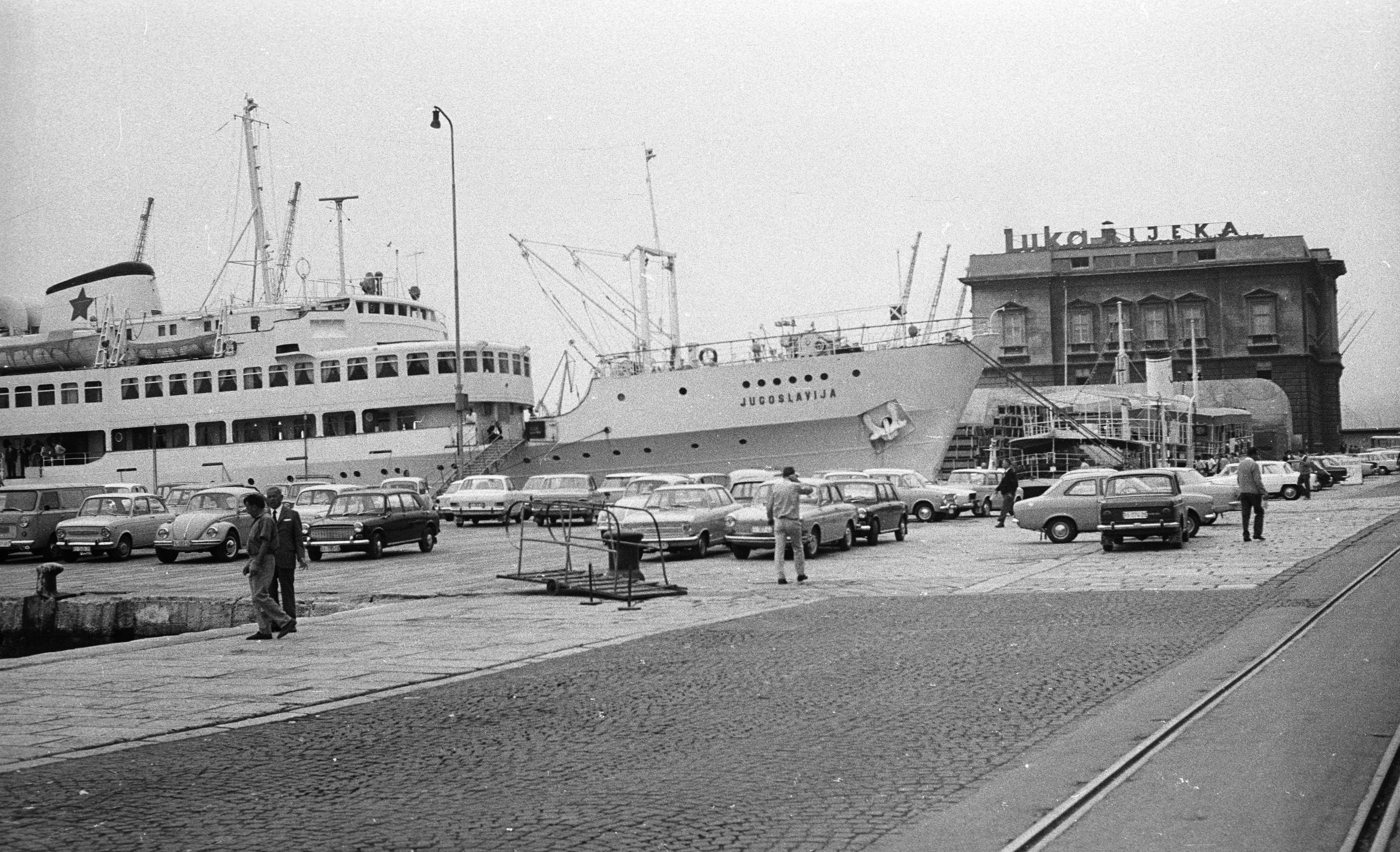 kikötő, Baross Gábor rakpart. Location: Croatia, Adriatic Sea, Rijeka Tags: ship, automobile, port, Yugoslavia, Volkswagen-brand Title: kikötő, Baross Gábor rakpart.